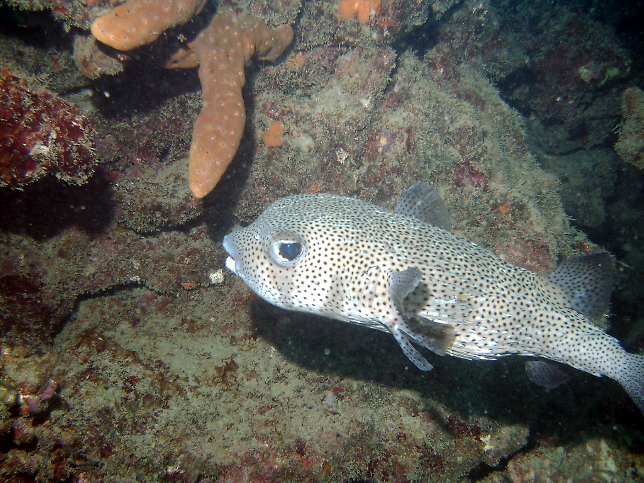 Pez Globo Erizo. Diodon hystrix. Feb-2004. Parque Nacional Morrocoy. Tucacas. Venezuela